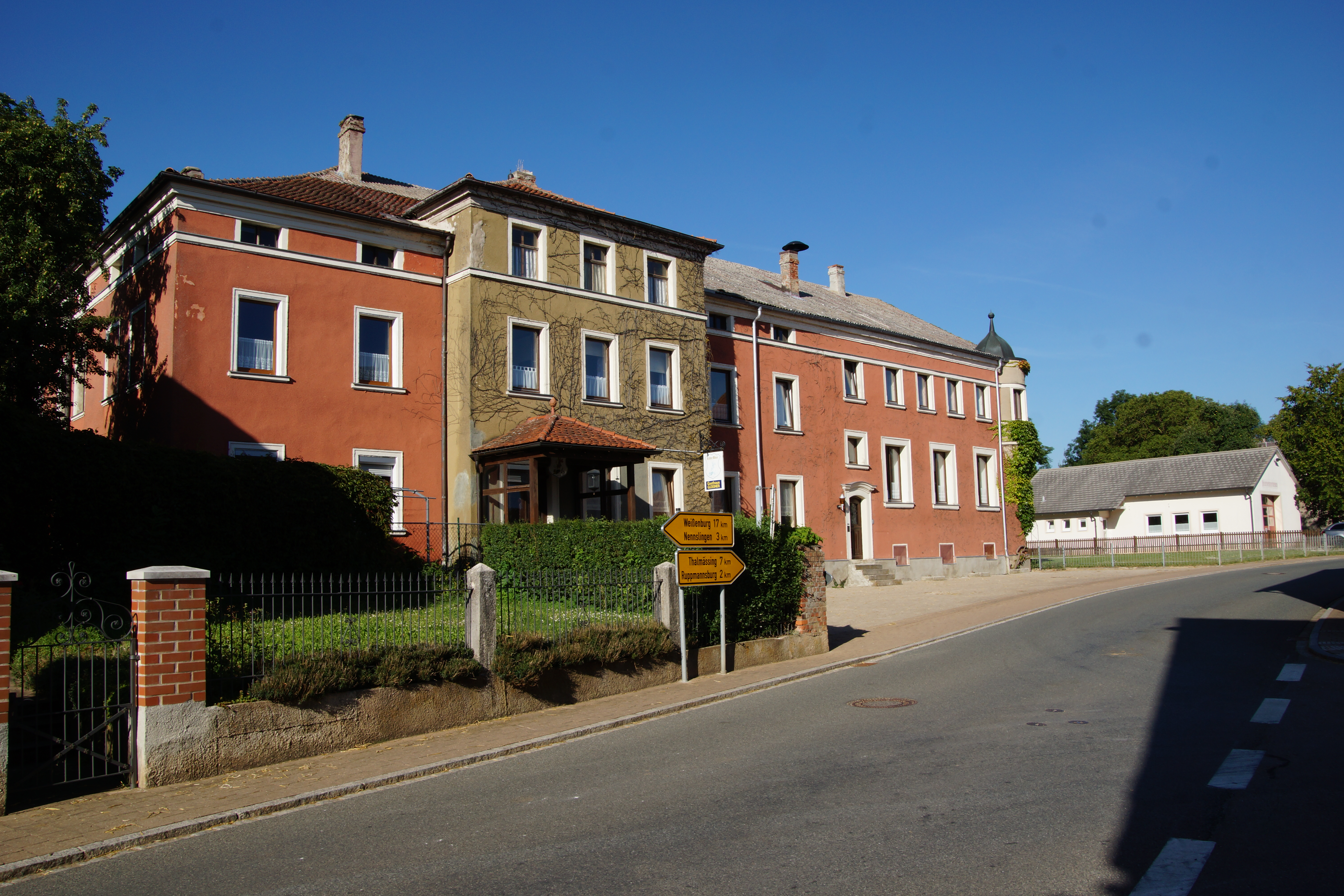 Das Kirchdorf Wengen bei Nennslingen